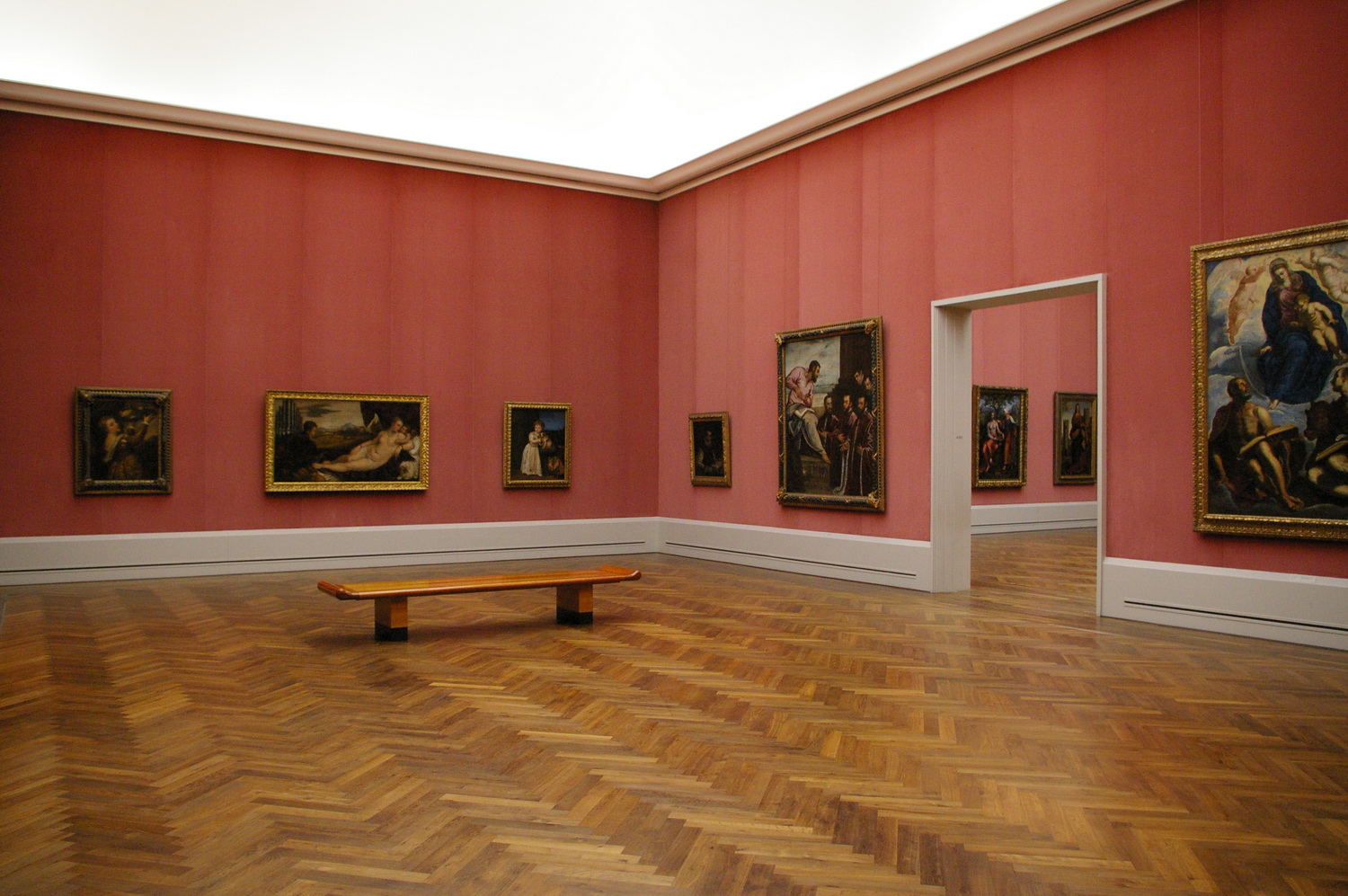 Gemäldegalerie de Berlin